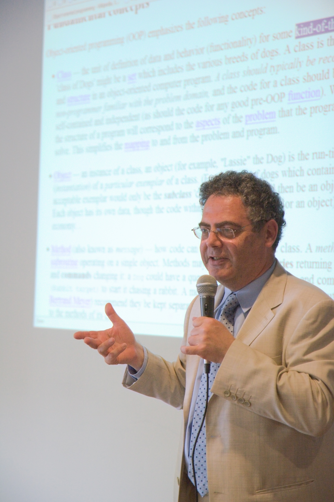 Bertrand Meyer während einem Vortrag am Wikipedia-Tag 2006 in Zürich, Schweiz